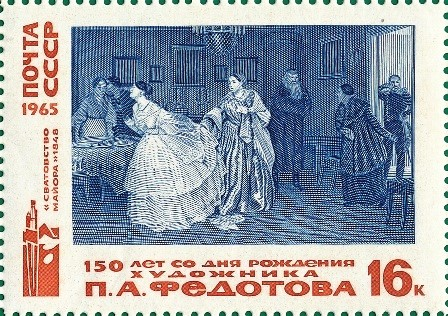 Почтовая марка СССР. 1965. Русское изобразительное искусство. Сватовство майора (худ. П.А. Федотов). Номер в каталоге ЦФА 3228